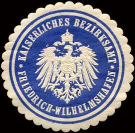 Sealing stamp Title: Kaiserliches Bezirksamt - Friedrich - Wilhelmshafen Description: blau, weiß, geprägt Place: size: 4 cm